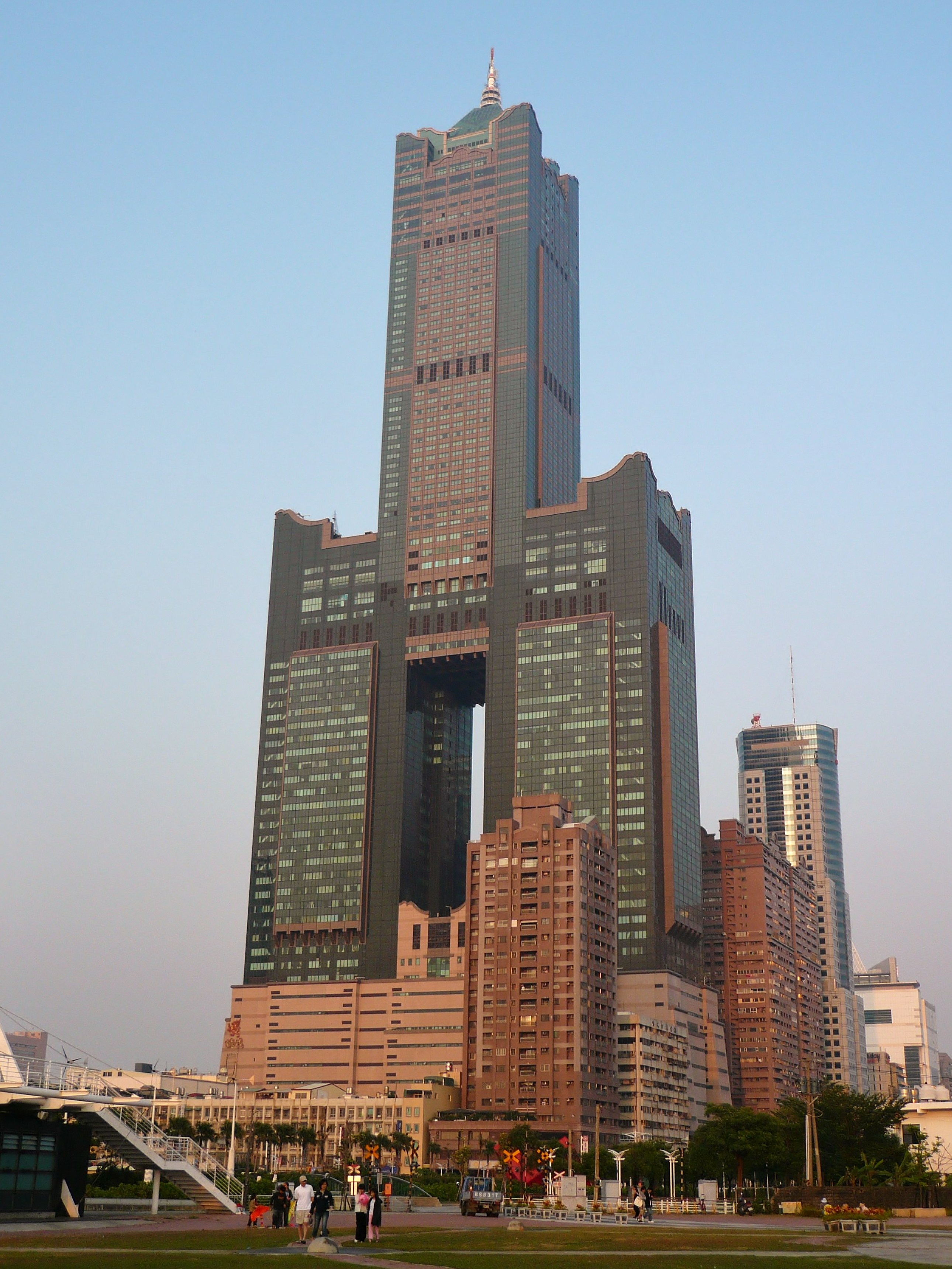 85大樓 攝於新光碼頭